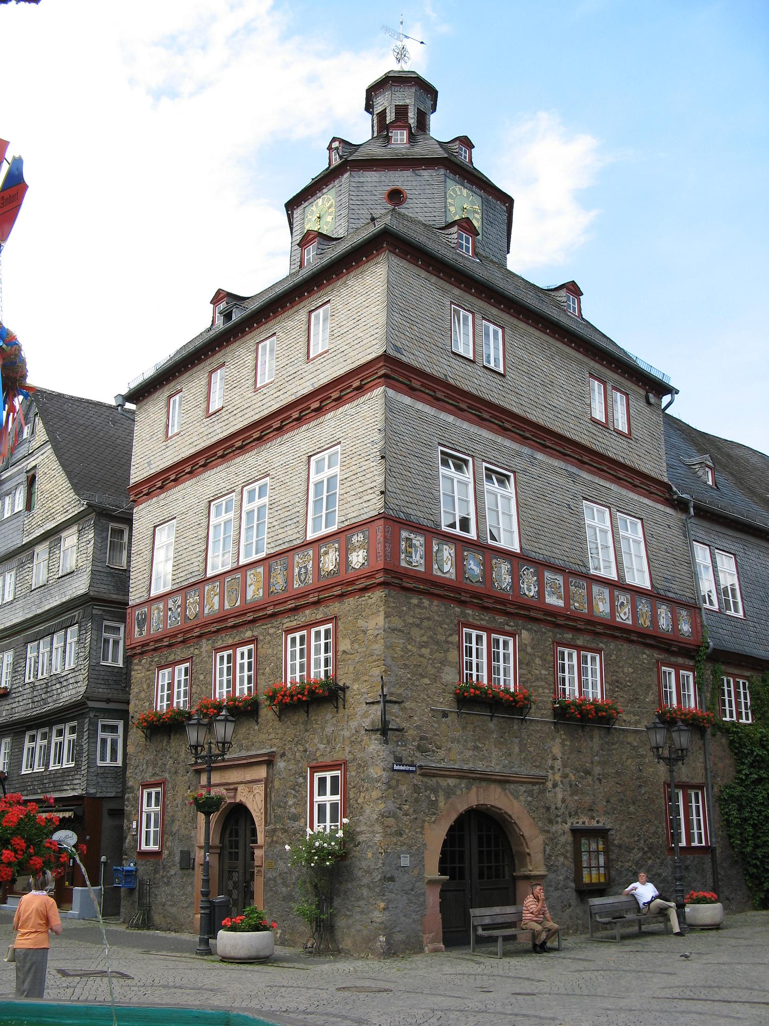 Das Rathaus in Herborn, erbaut 1589/90